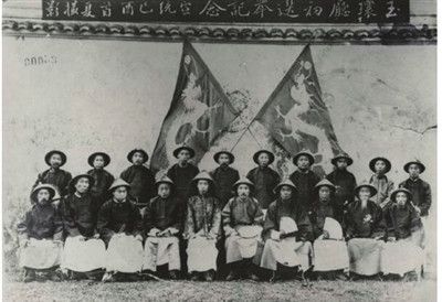 中文（中国大陆）: 清代宣统元年（1909年）玉环厅初选举的纪念照片